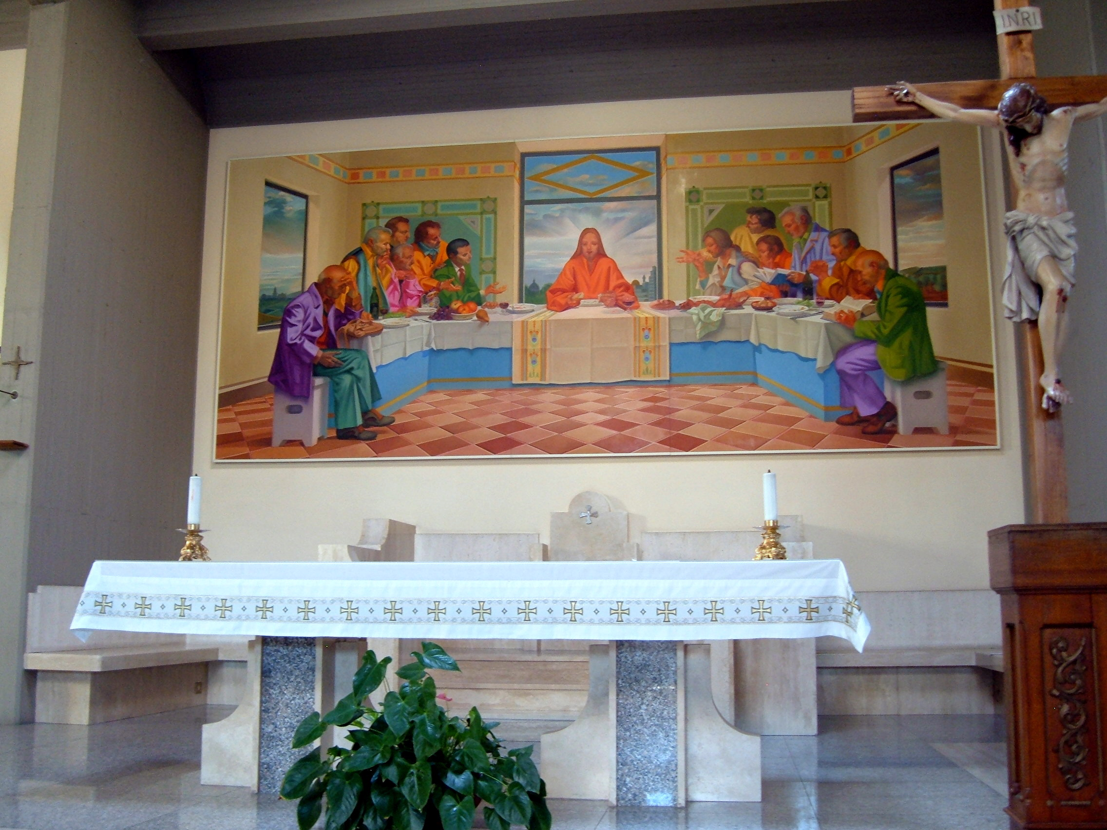 Chiesa parrocchiale di Santa Maria Domenica Mazzarello, a Roma, nel quartiere Don Bosco. Altare maggiore.